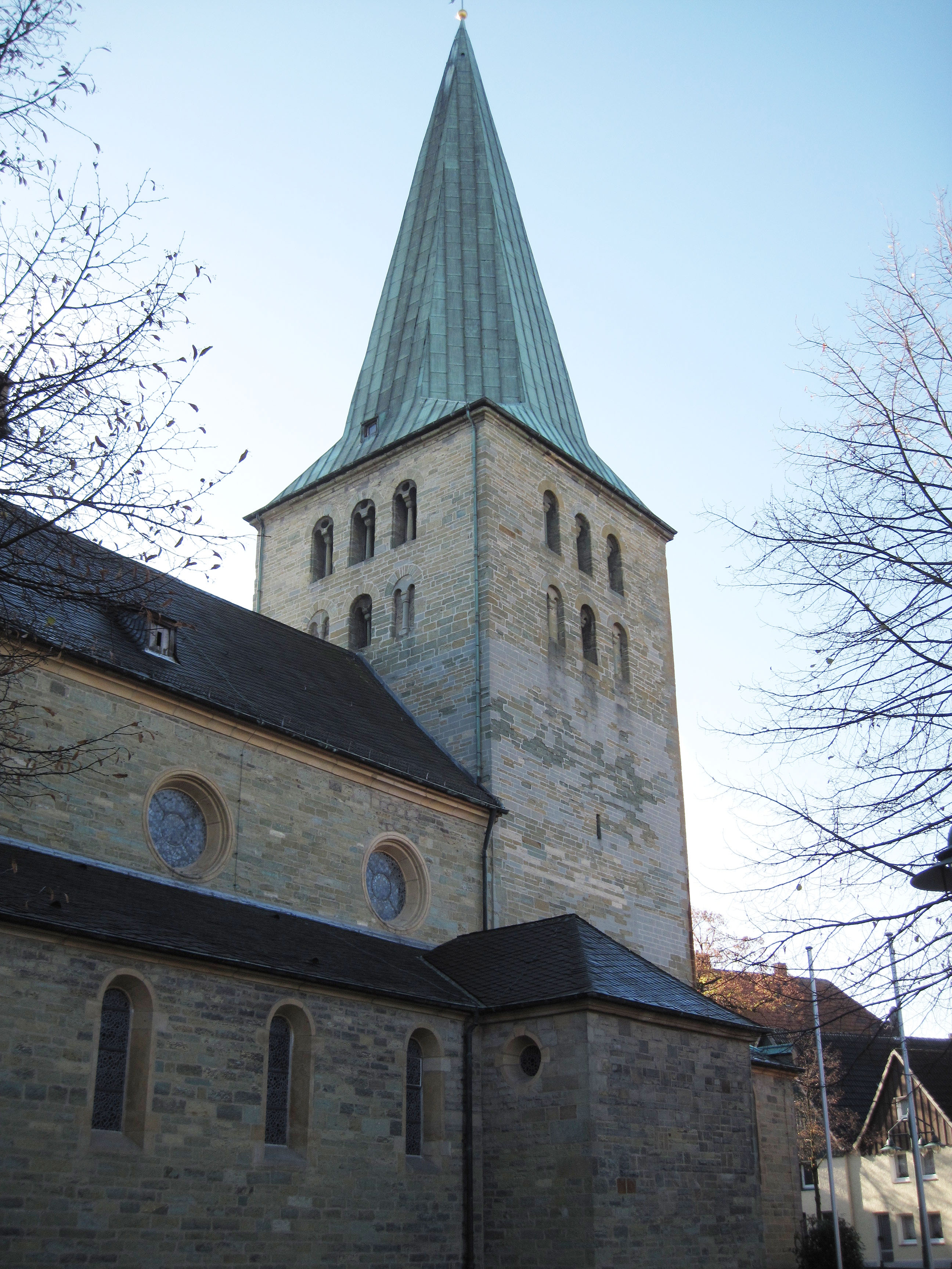 Hamm, Rhynern, Katholische Kirche St, Regina, Ansicht von der Rückseite in Richtung Turm